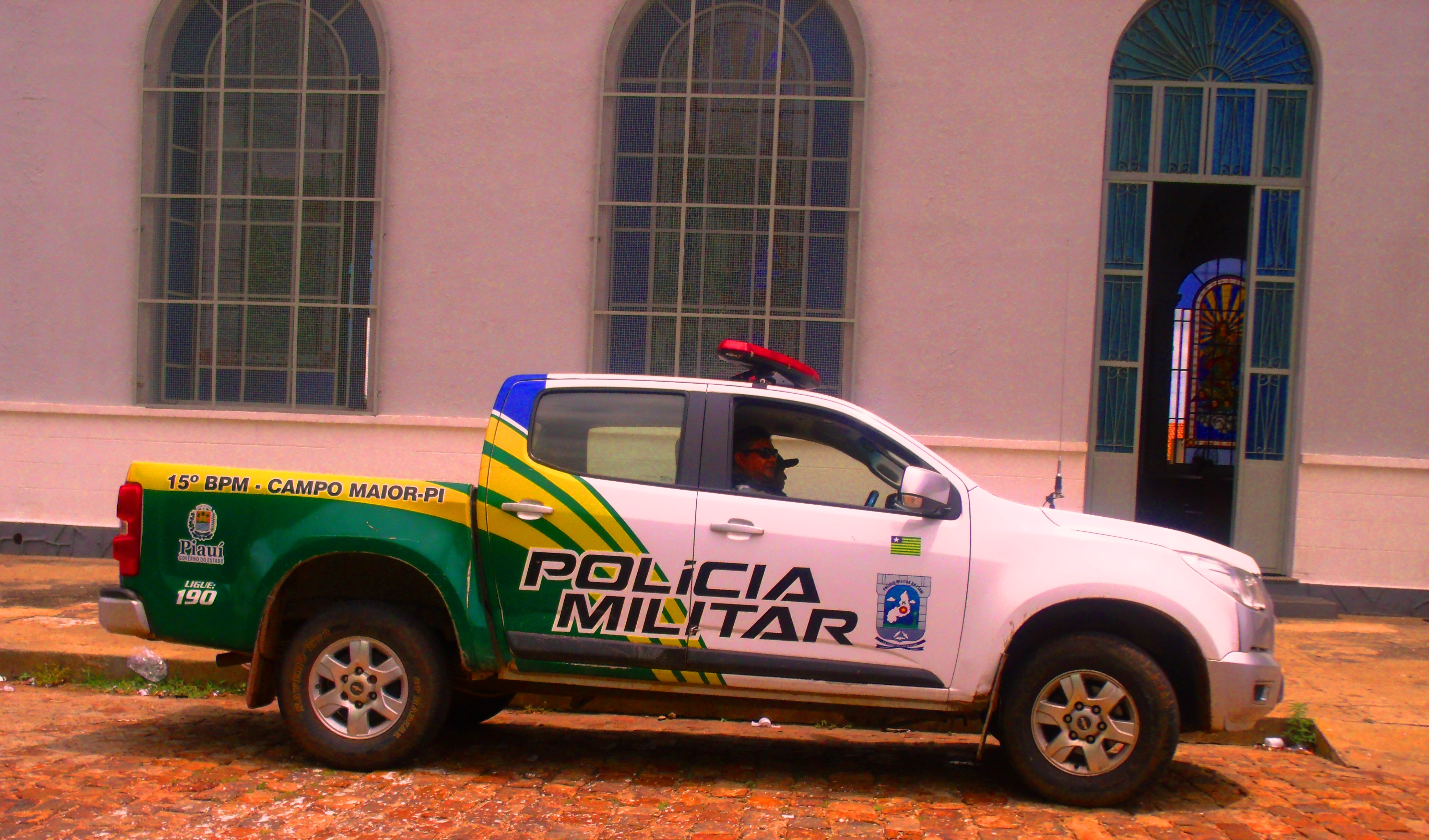 Imagem de um automóvel da Polícia Militar do Piauí.